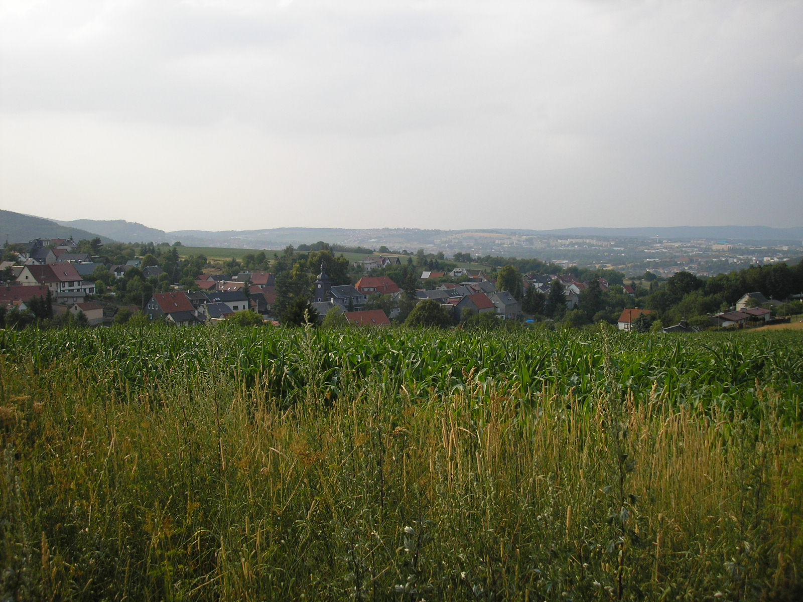 Blick auf Oehrenstock (vorn) und Ilmenau (hinten).